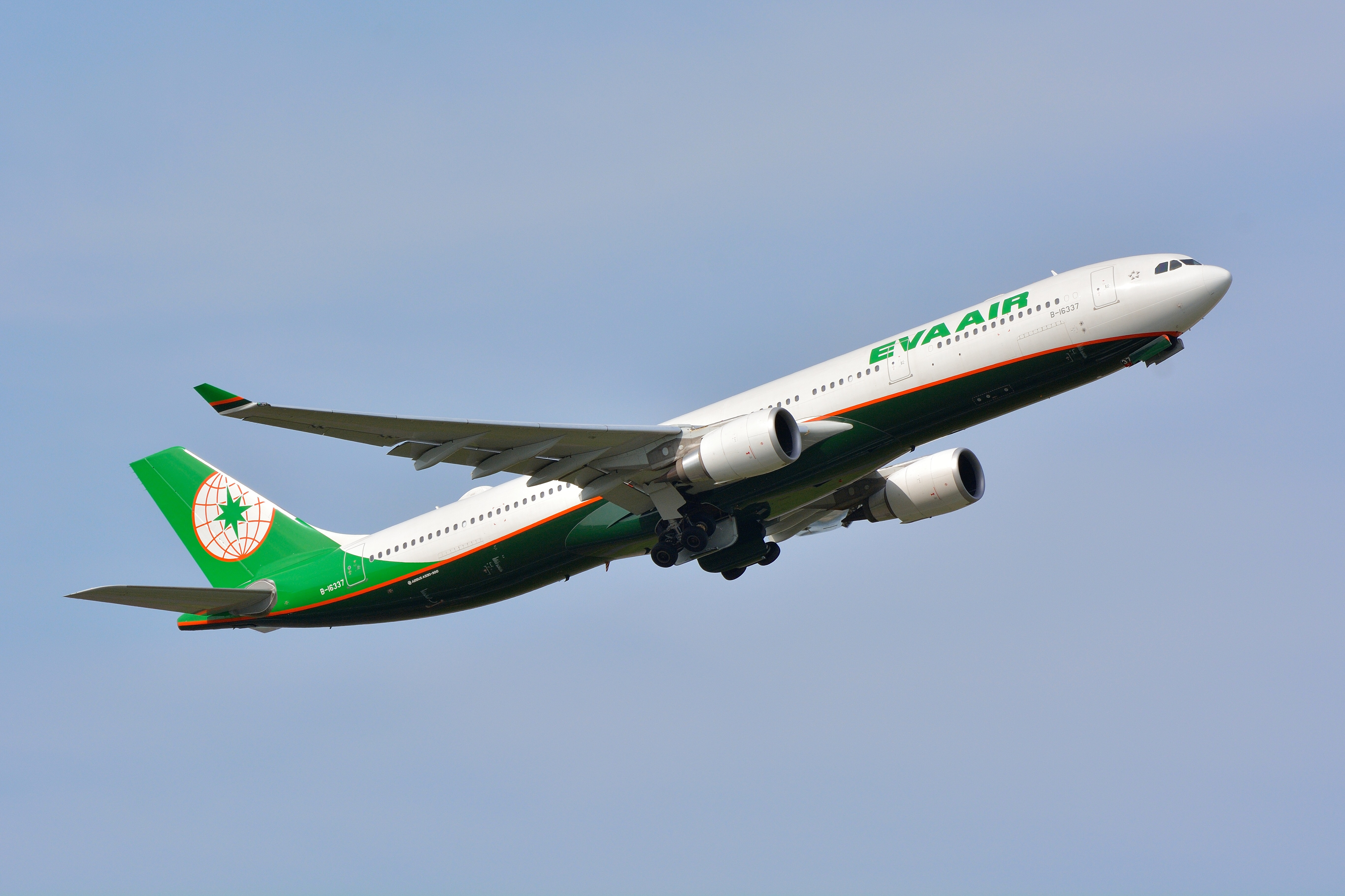 EVA Air, Airbus A330-300 B-16337 NRT